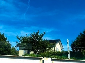 成田空港内にある木の根ペンション